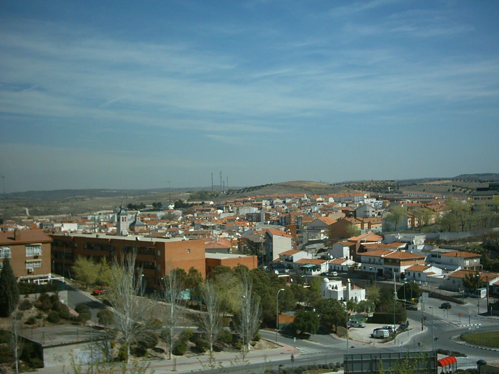 Arganda del Rey skyline